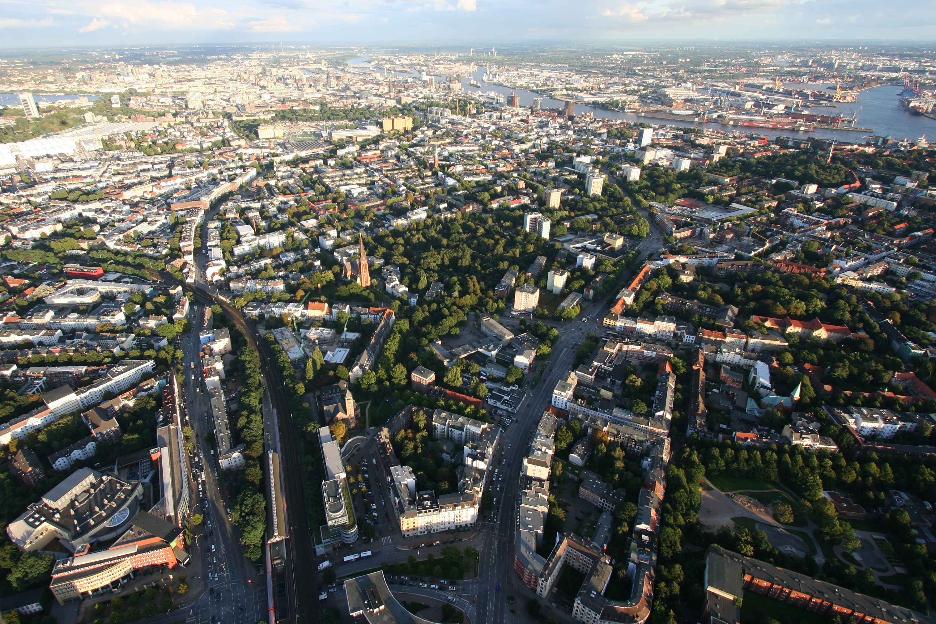 Stresemannstraße (links), Holstenstraße (Mitte rechts), ganz links unten die "Neue Flora"